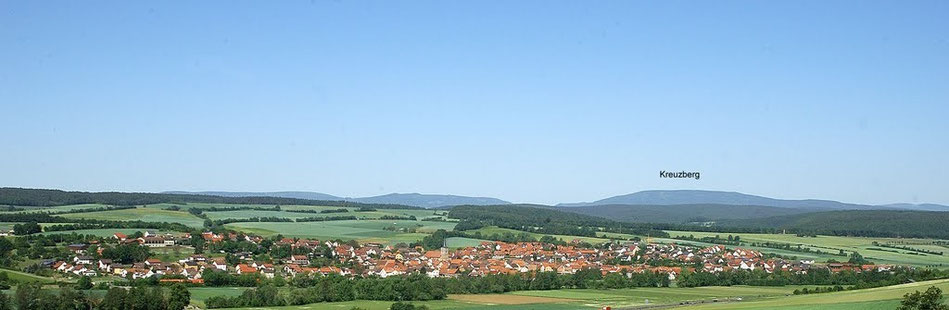 Blick vom Höhberg auf Burglauer